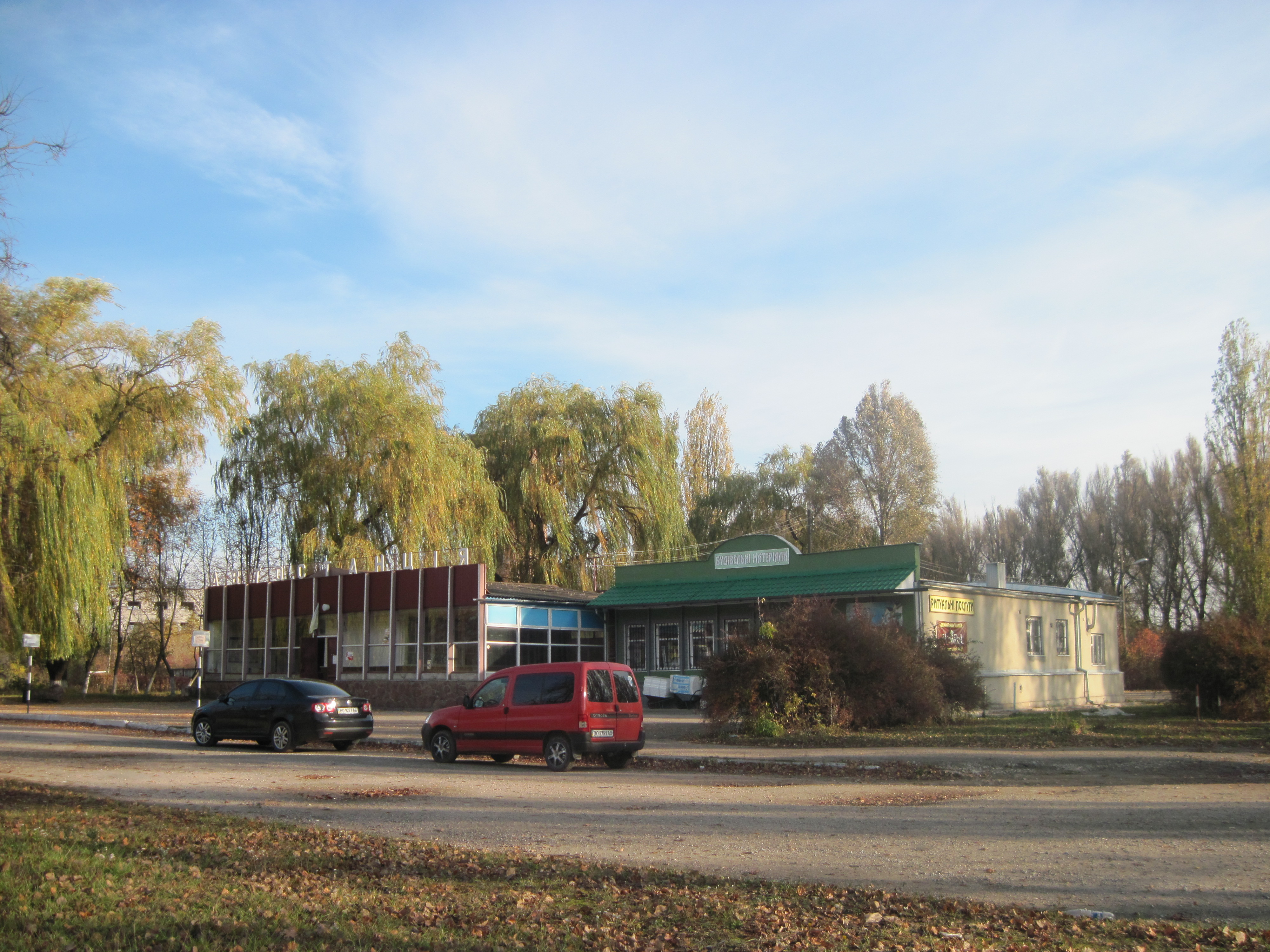 Zbaraż